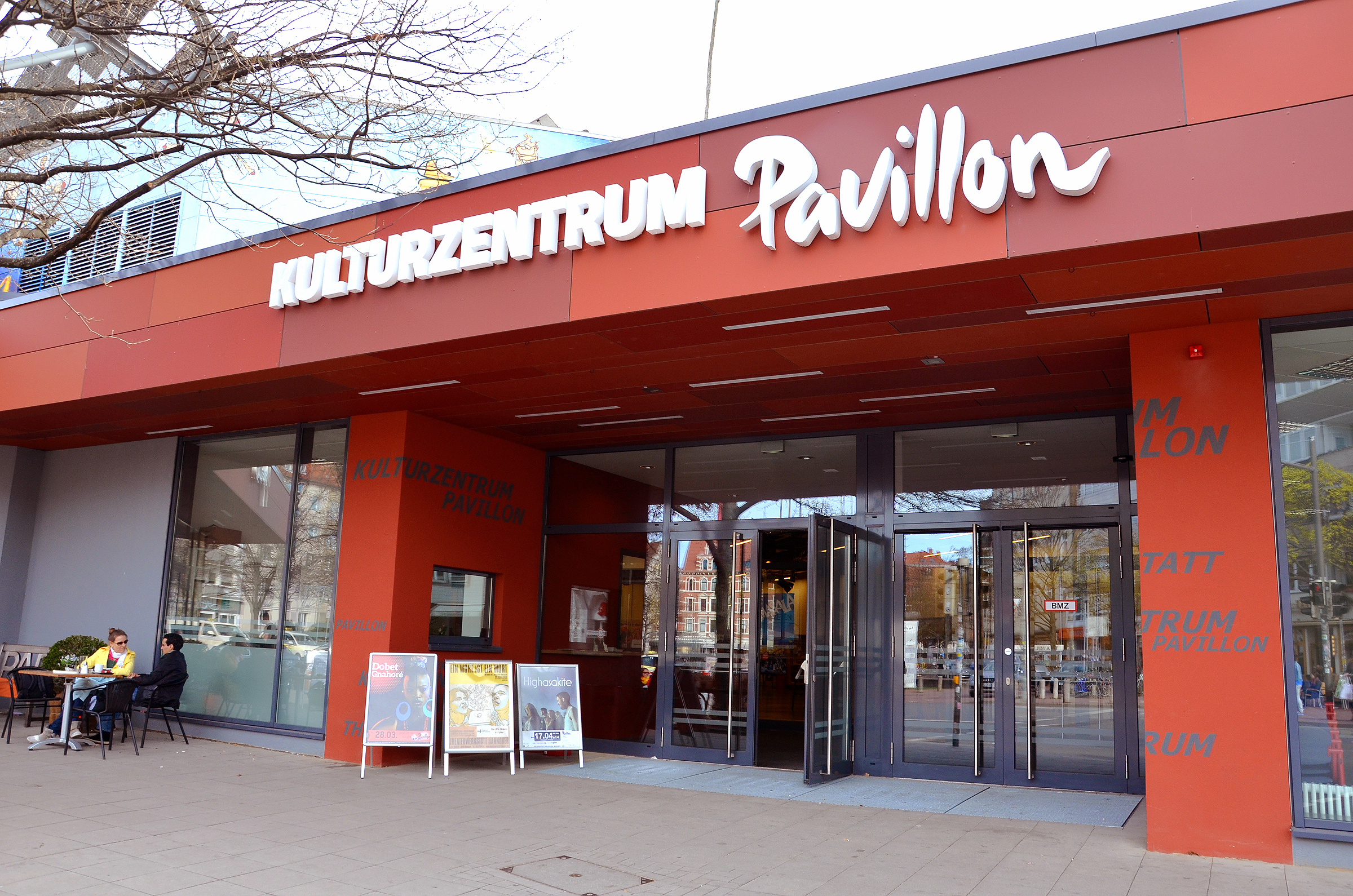 Der neu gestaltete Haupteingang mit den neuen Schriftzügen (auch der Theaterwerkstatt Hannover) am frisch sanierten Kulturzentrum Pavillon unter der Adresse Lister Meile 4 zwischen dem Weißekreuzplatz und dem Raschplatz ...